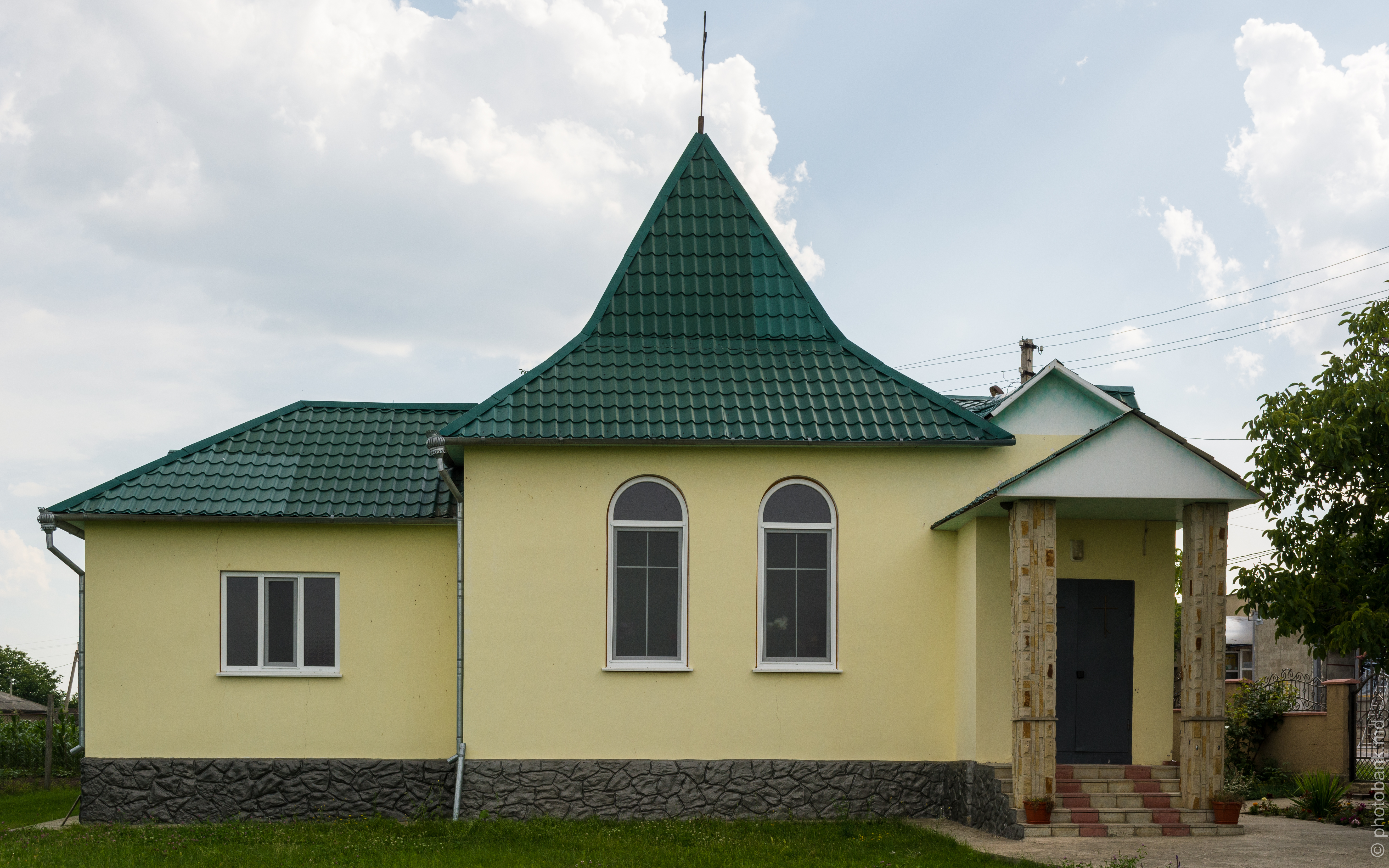 Адрес: Корлатены, ул. Виилор 4/а